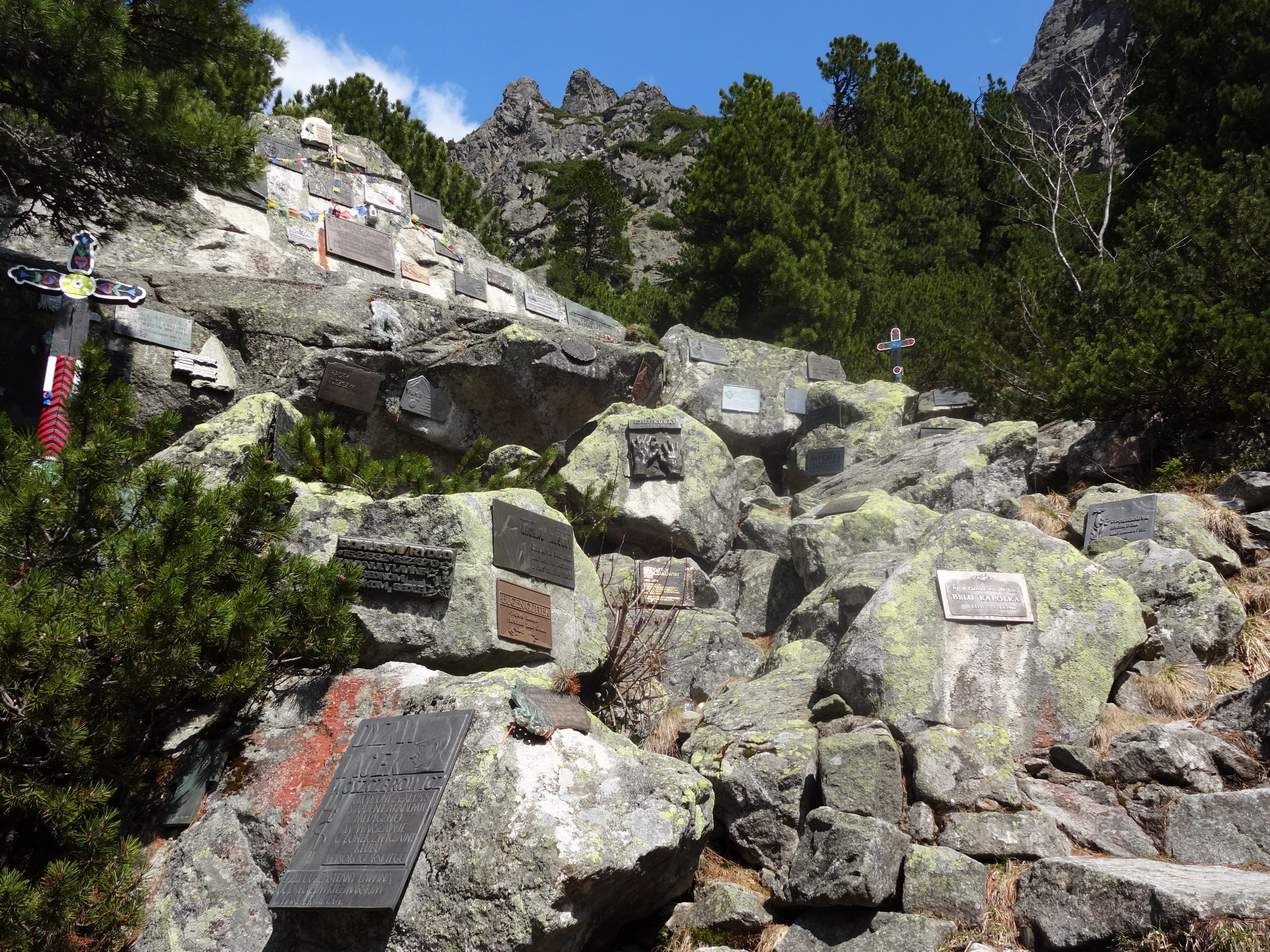 Tatrzański Cmentarz Symboliczny